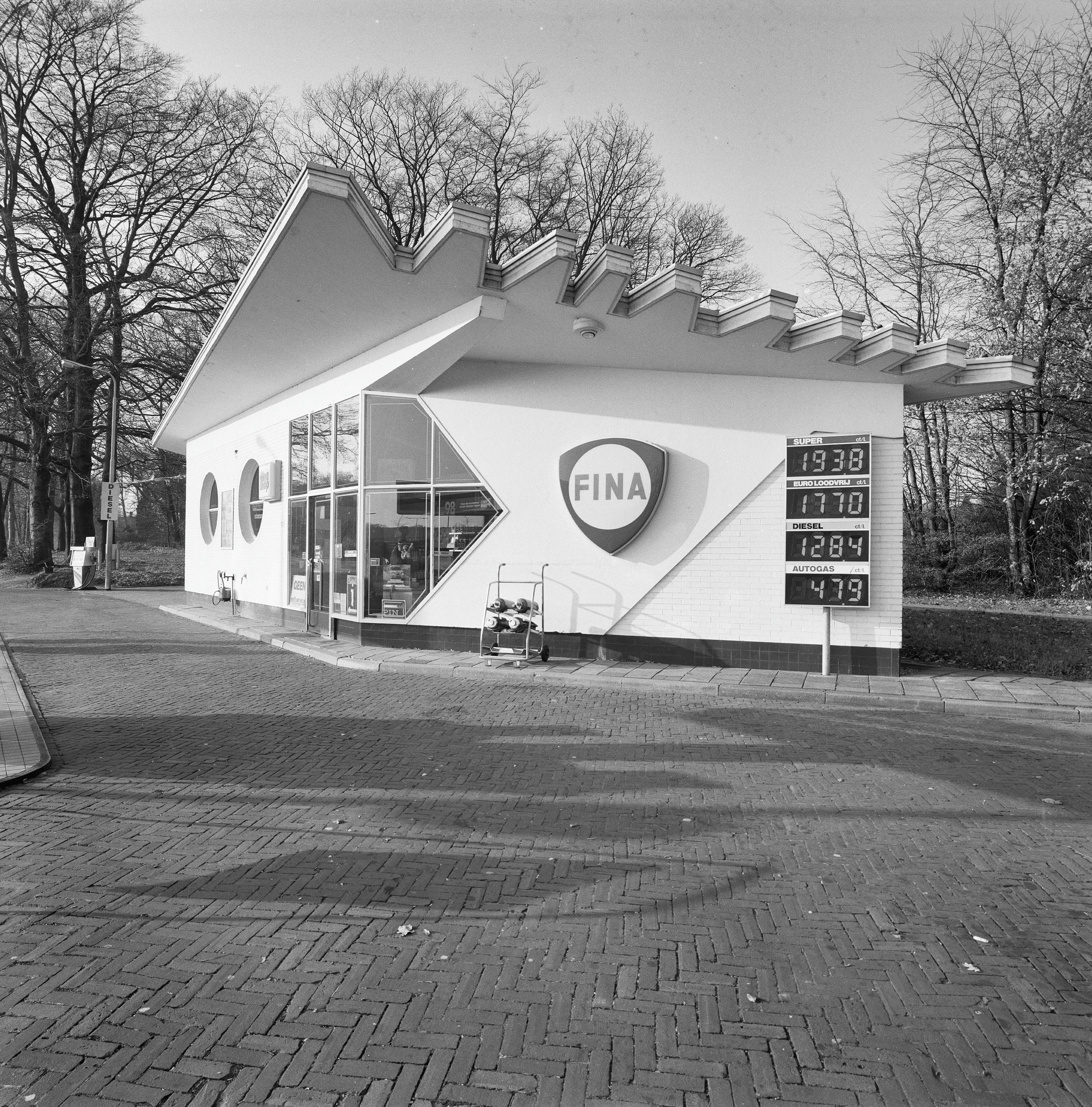 BENZINESTATION FINA: Exterieur OVERZICHT VOORGEVEL, RECHTER ZIJGEVEL